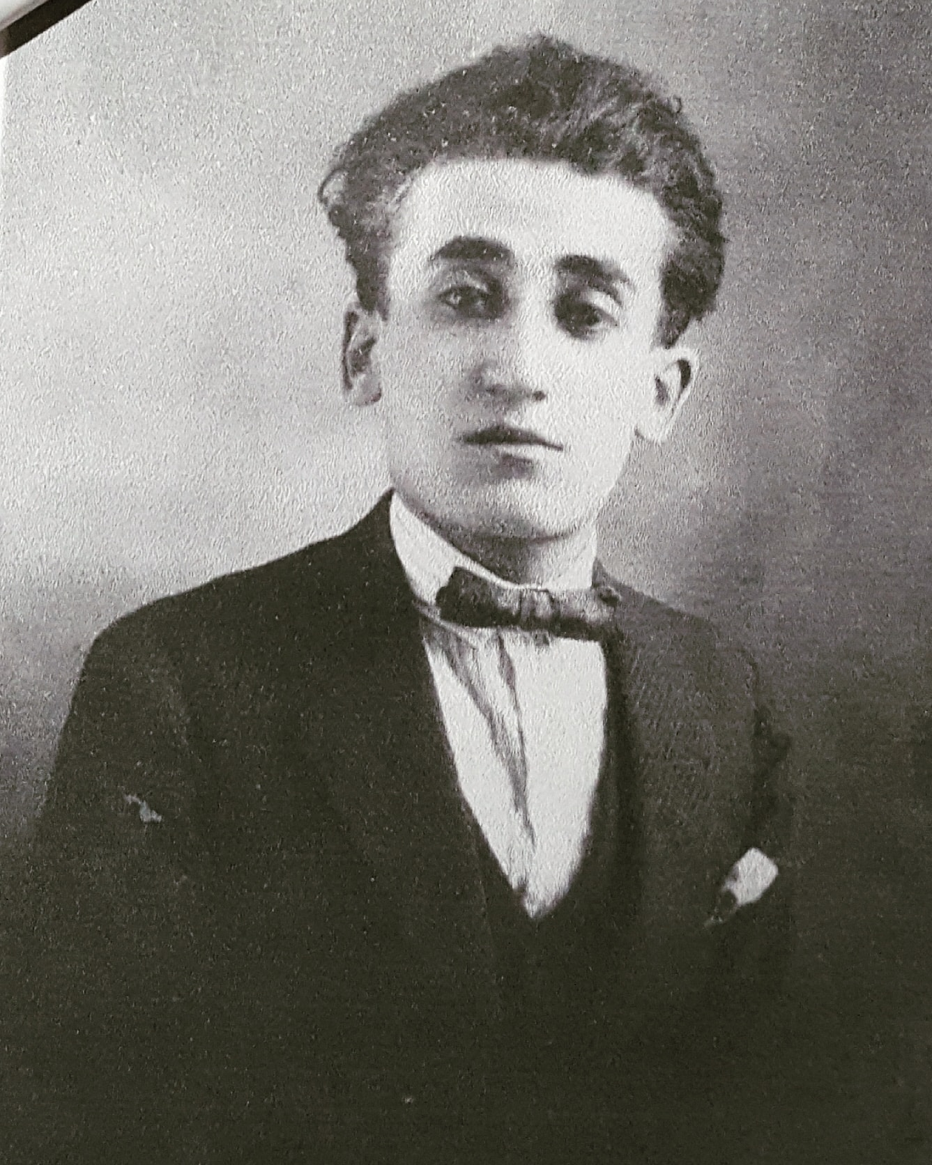 Mario Zumpano Albamonte